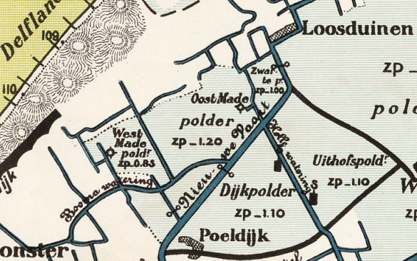 Madepolders